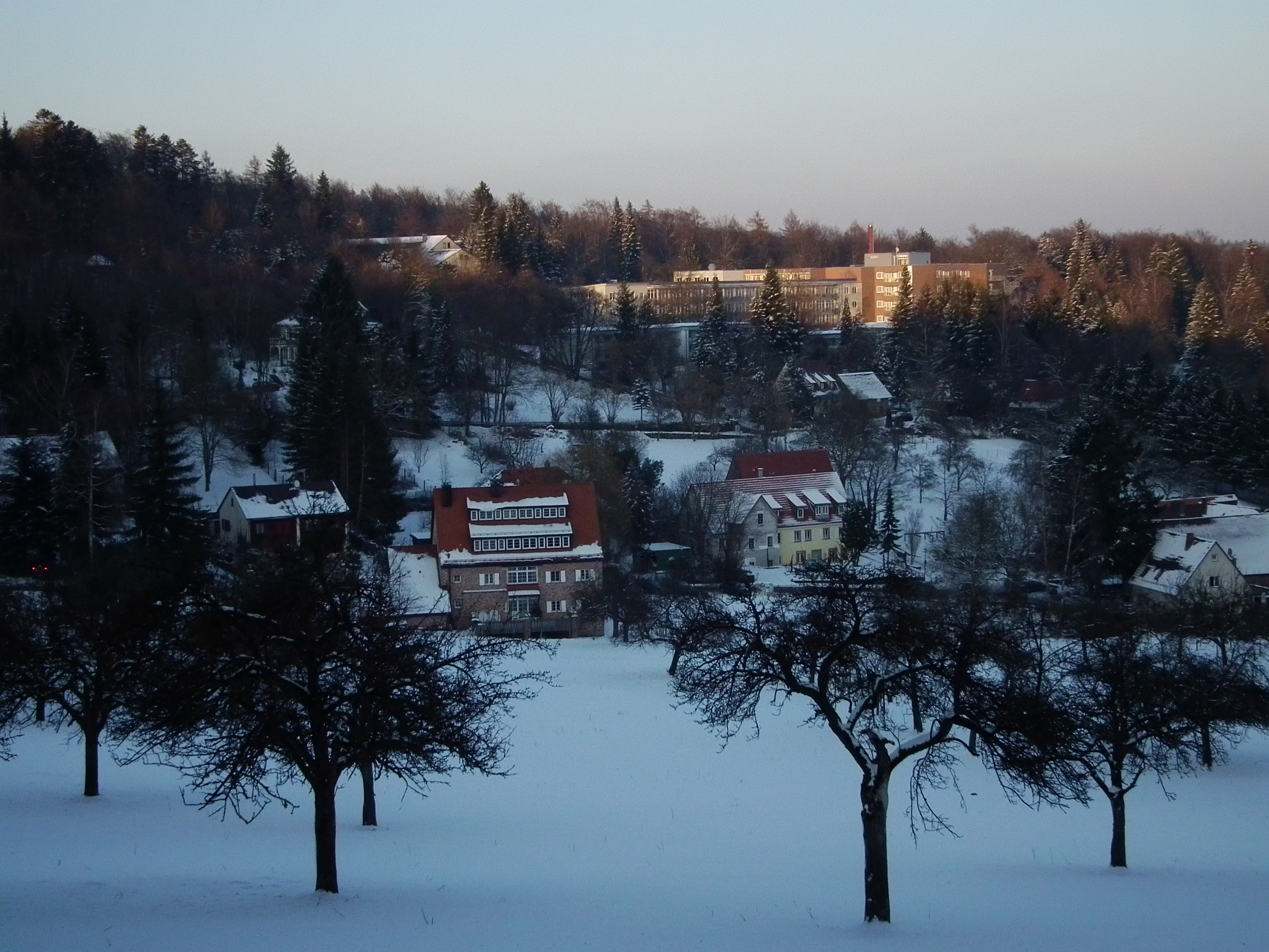 Heidelberger Kohlhof (Baden-Württemberg, Deutschland)